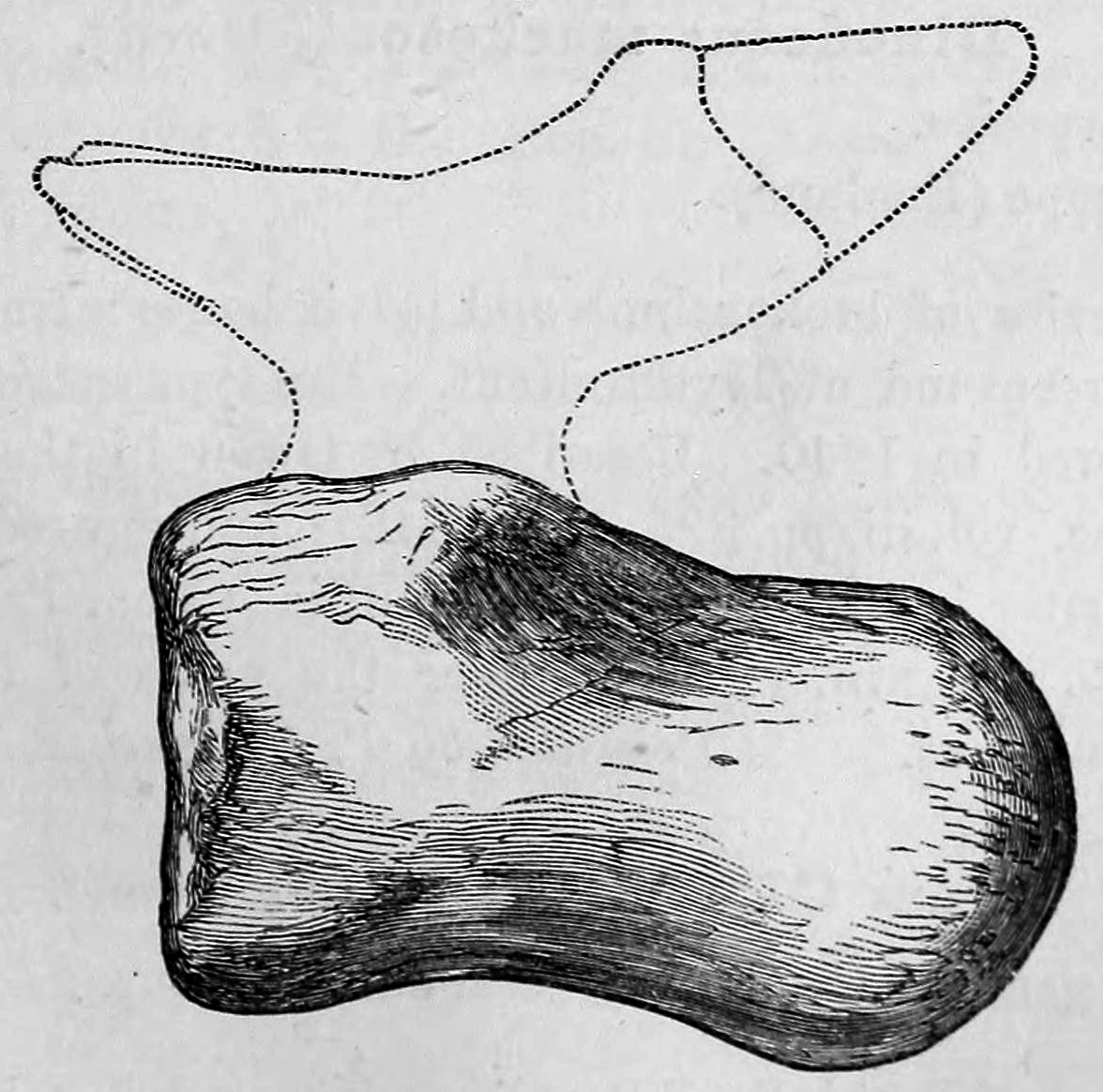 Iuticosaurus lectotype caudal vertebra.